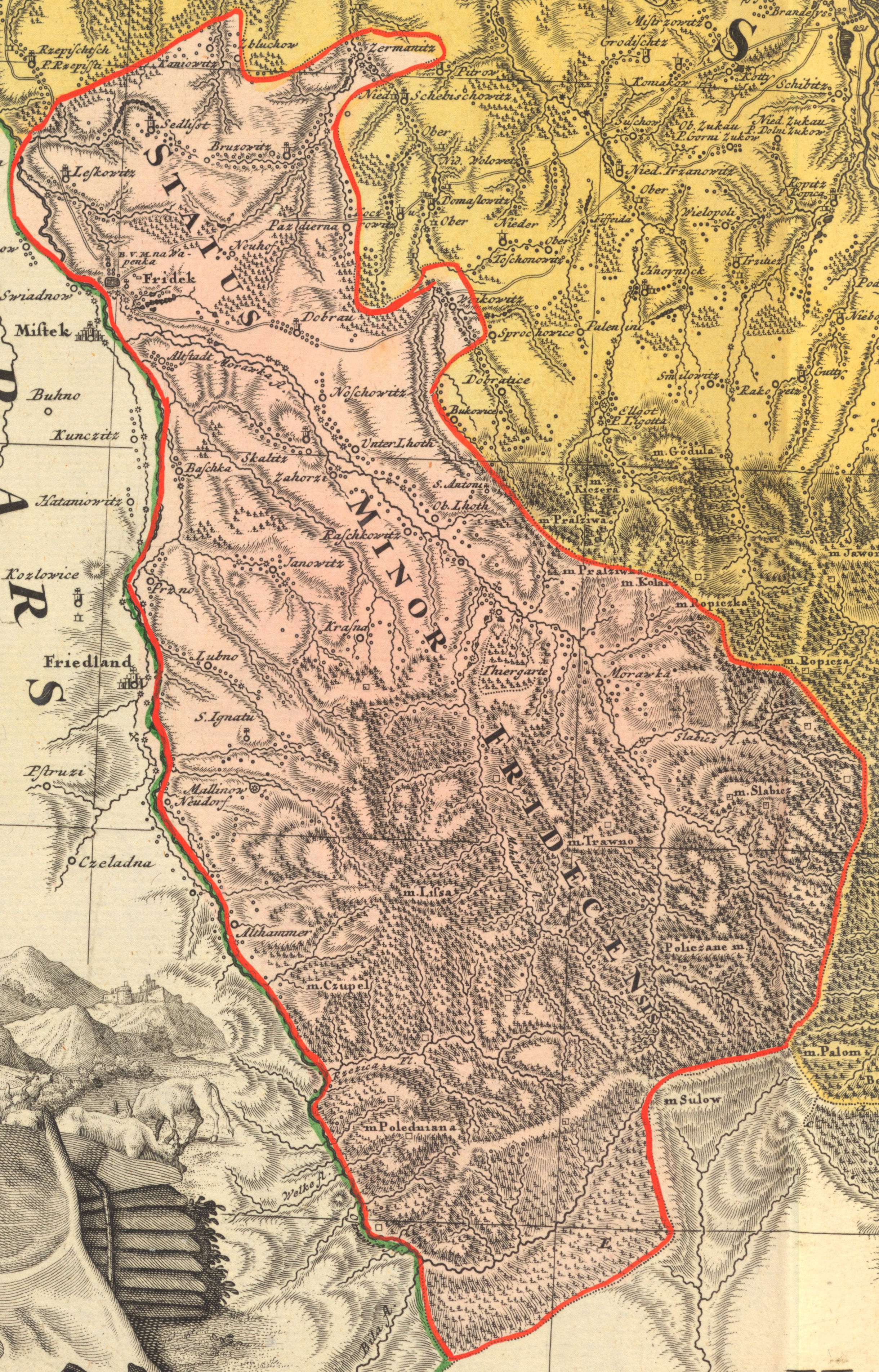 Mapa Księstwa Cieszyńskiego Matthaeusa Schubartha z 1736